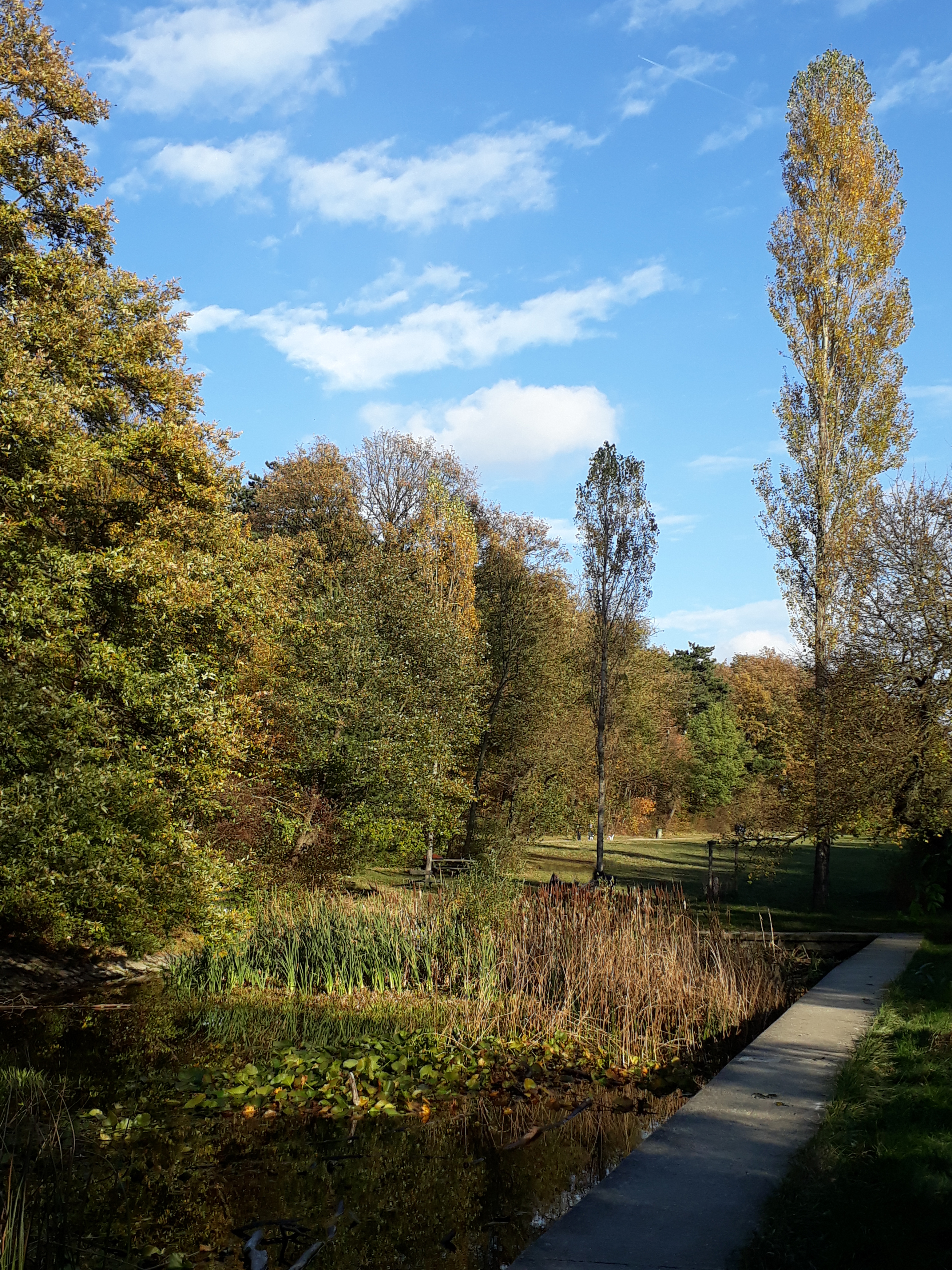 Pappelteich im Maurer Wald, Wien, 23. Bezirk